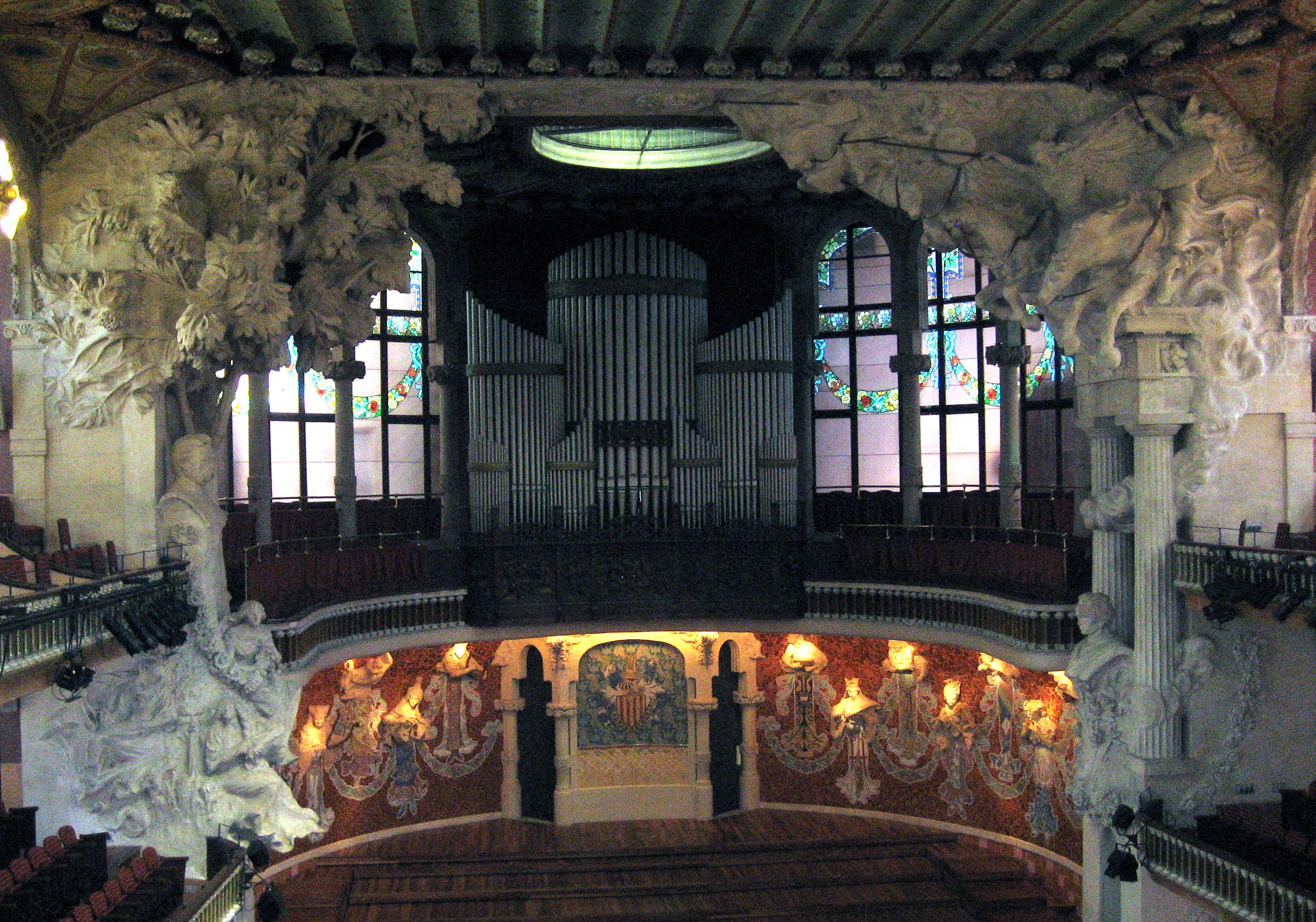 Escenario del Palau de la Música Catalana en Barcelona